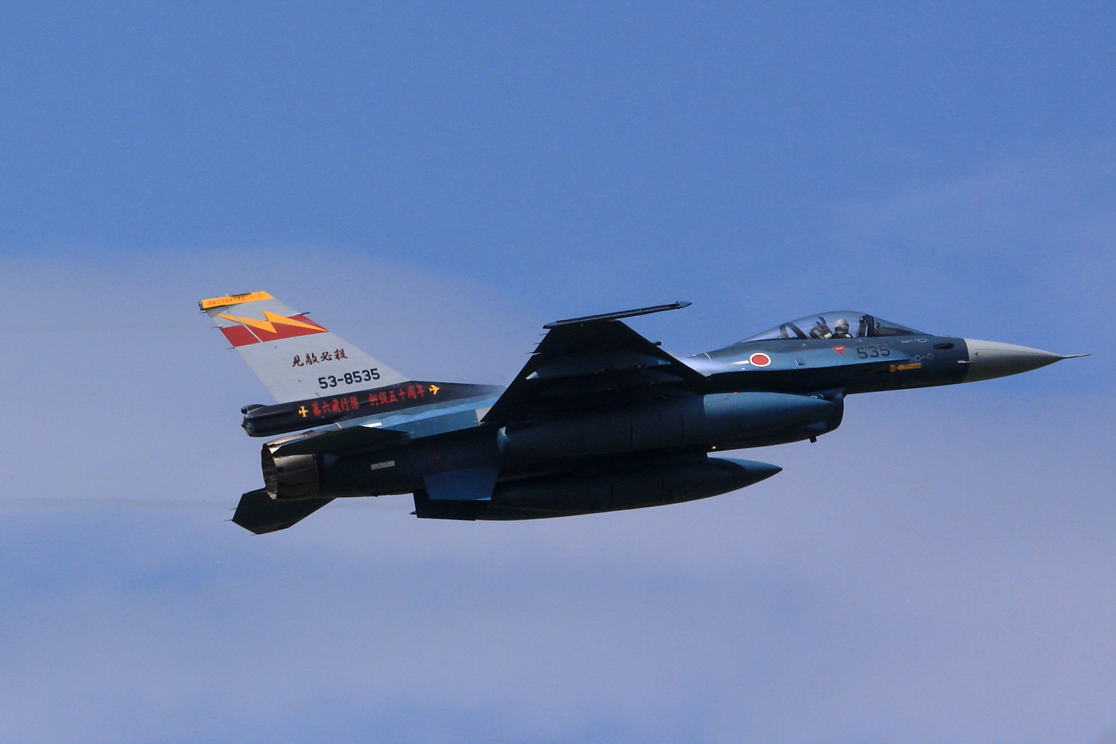 2009年総合火力演習で撮影された、第6飛行隊のF-2戦闘機 第6飛行隊創設50周年記念塗装機